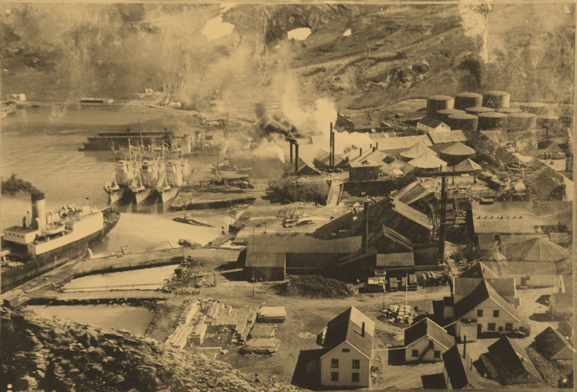 Grytviken - Musée - Photo de la station en pleine activité